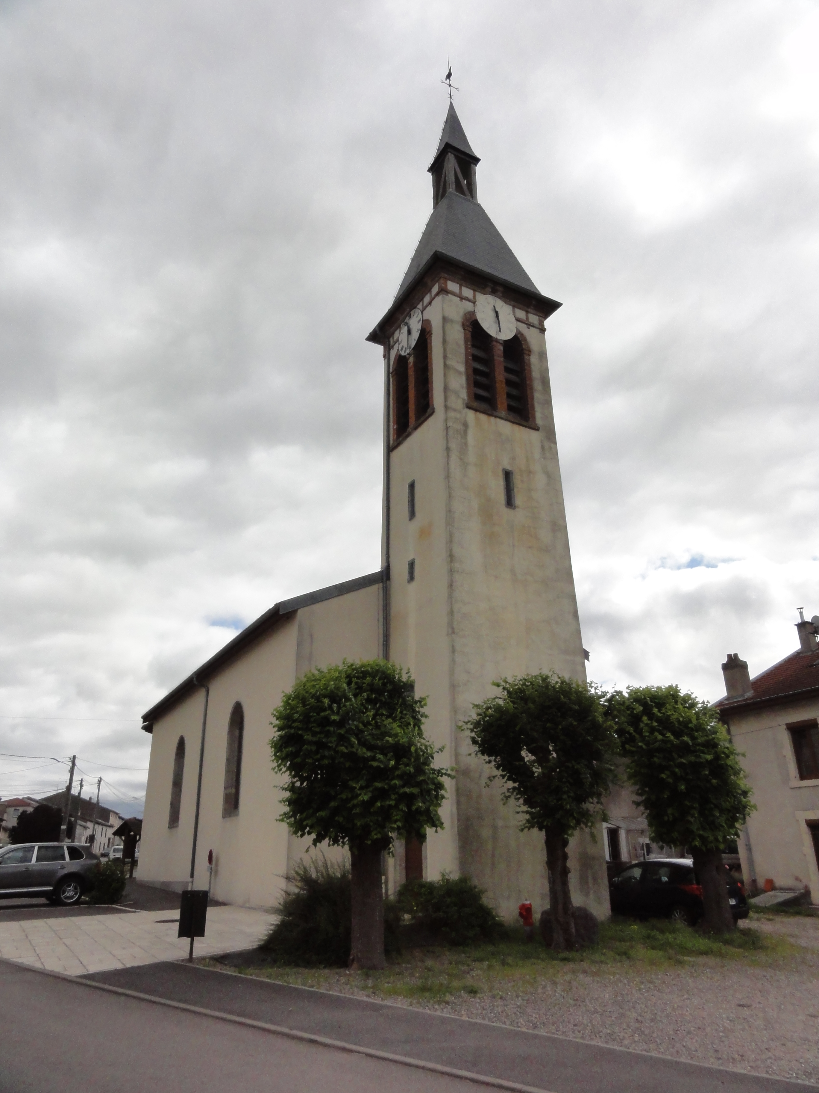 Hudiviller (M-et-M) église churches in Meurt